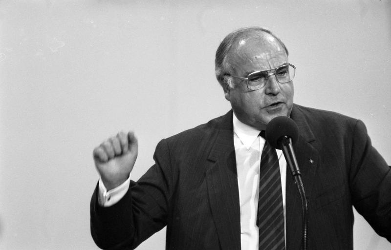 11.-13.9.1989 37. Bundesparteitag der CDU in der Bremer Stadthalle